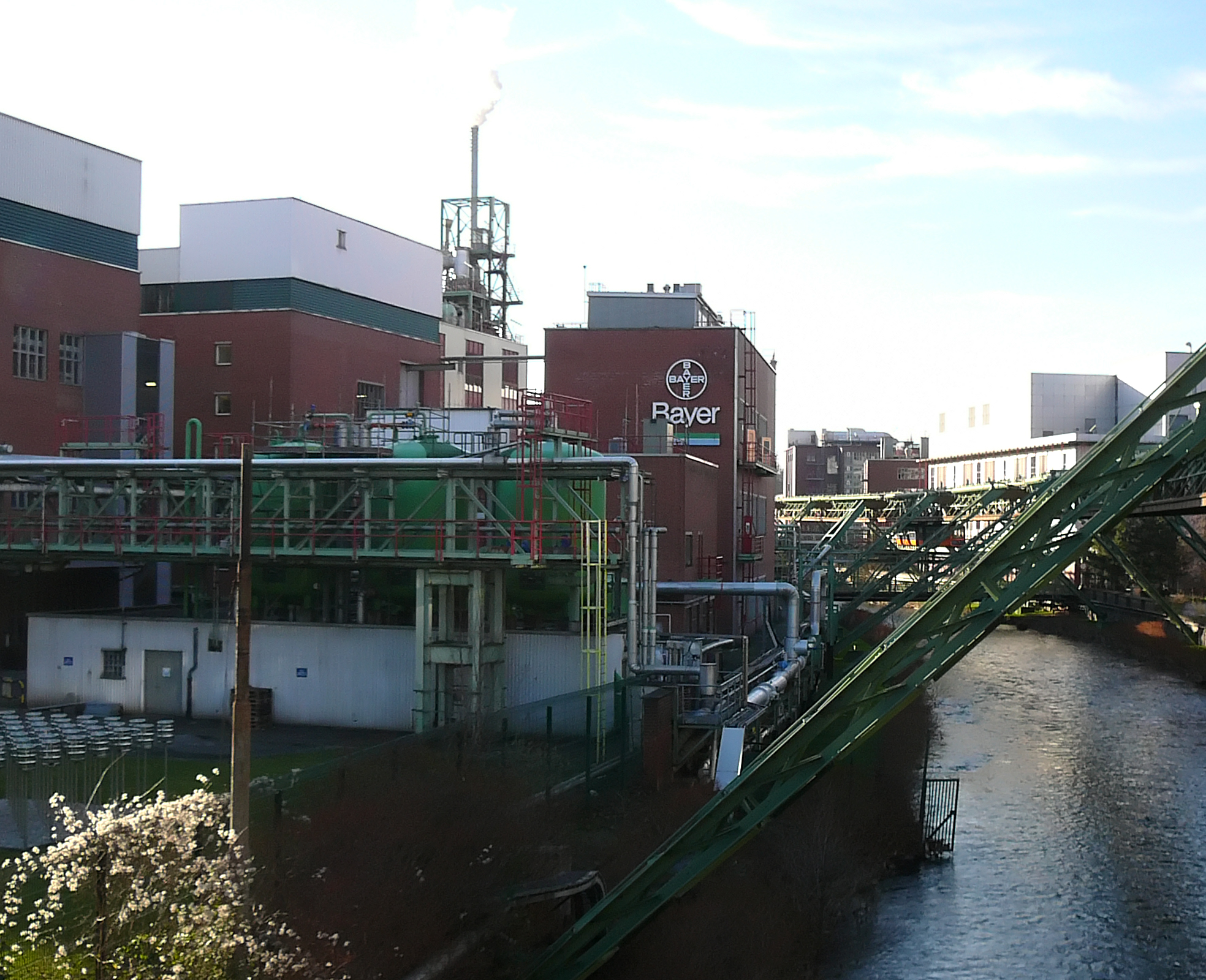 Friedrich-Ebert-Str., Wuppertal